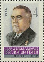 Почтовая марка СССР - Шателен Михаил Андреевич, Герой Социалистического Труда